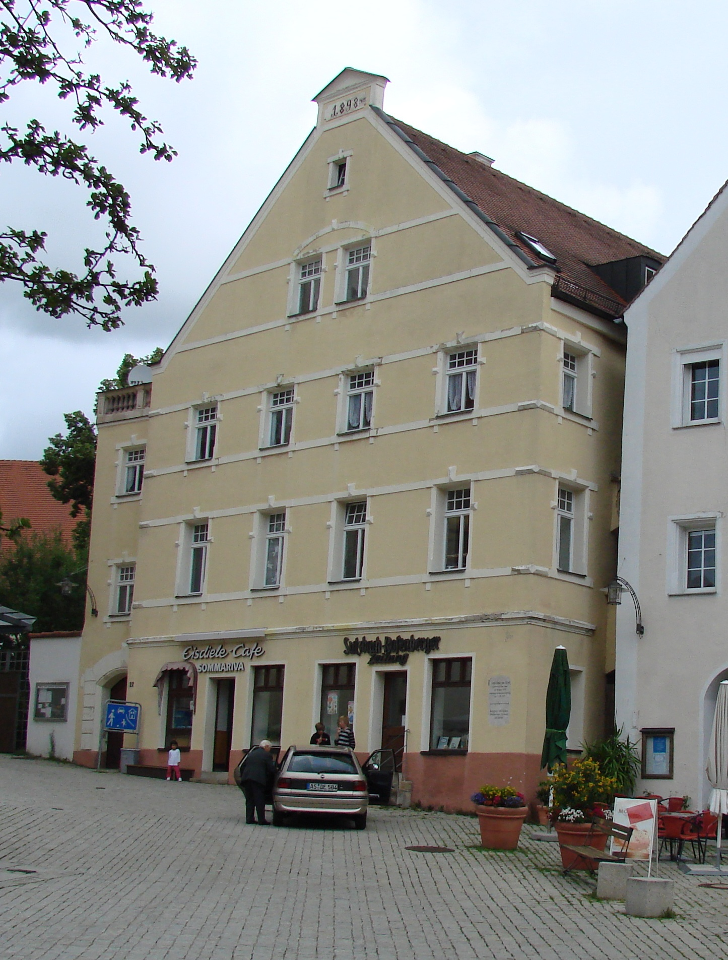 sogenanntes Jakobhaus in Sulzbach-Rosenberg, Geburtshaus von Joseph Franz von Allioli